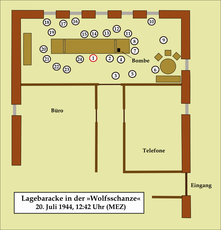 Besprechung in der Lagebaracke des Führerhauptquartiers »Wolfsschanze« am 20. Juli 1944. Nach einer Skizze in Gerd R. Ueberschär: Stauffenberg - Der 20. Juli 1944, Frankfurt/Main 2004.